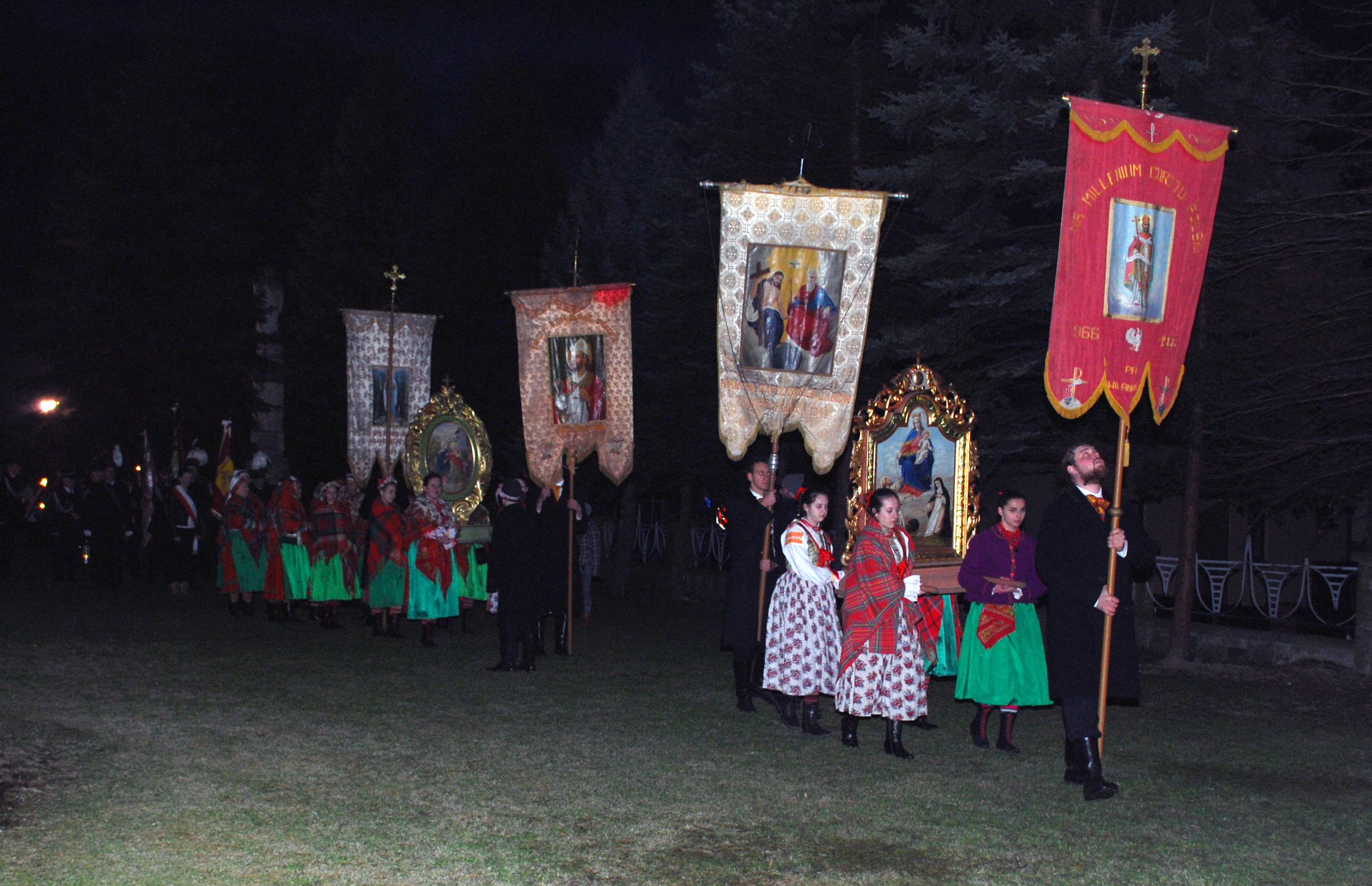 Wigila Paschalna w Wilamowicach - procesja